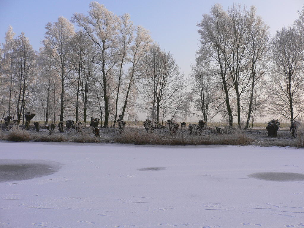 Geknotte wilgen van op het bevroren Sint-Jakobsmoer